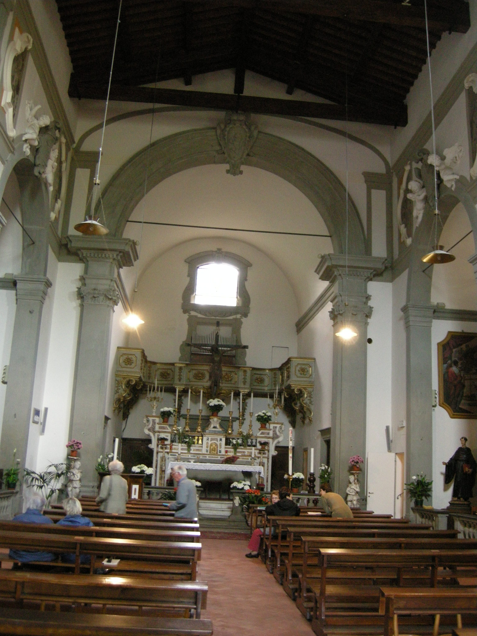 San francesco di paola (florence), interno